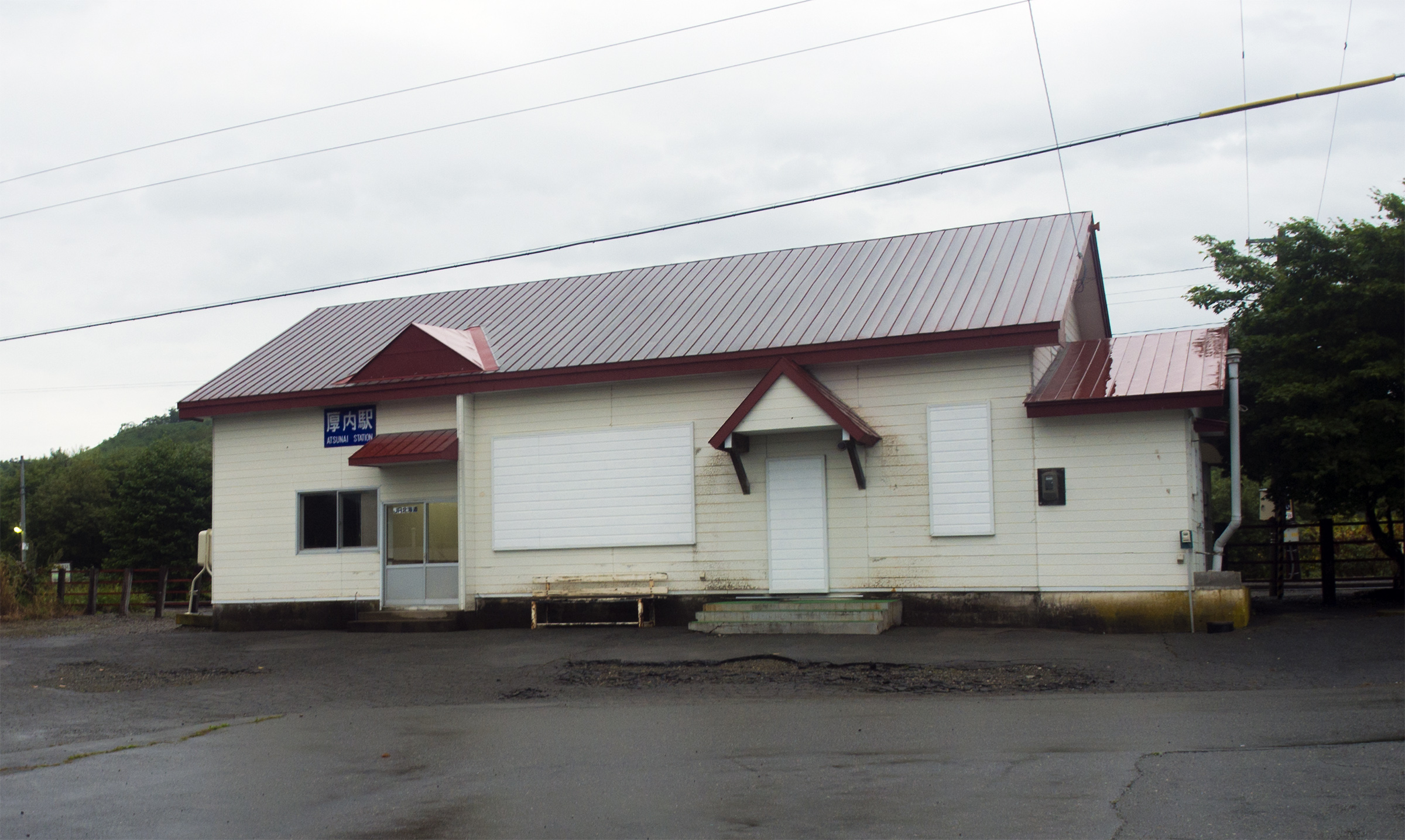 北海道旅客鉄道株式会社根室本線厚内駅